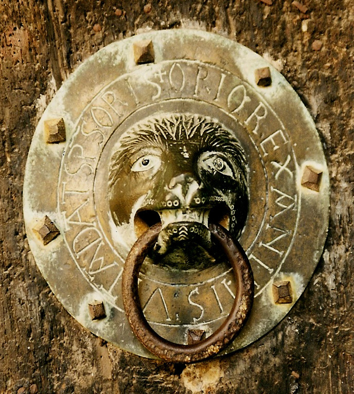 St.-Julien Brioude, Türklopfer SW-Portal